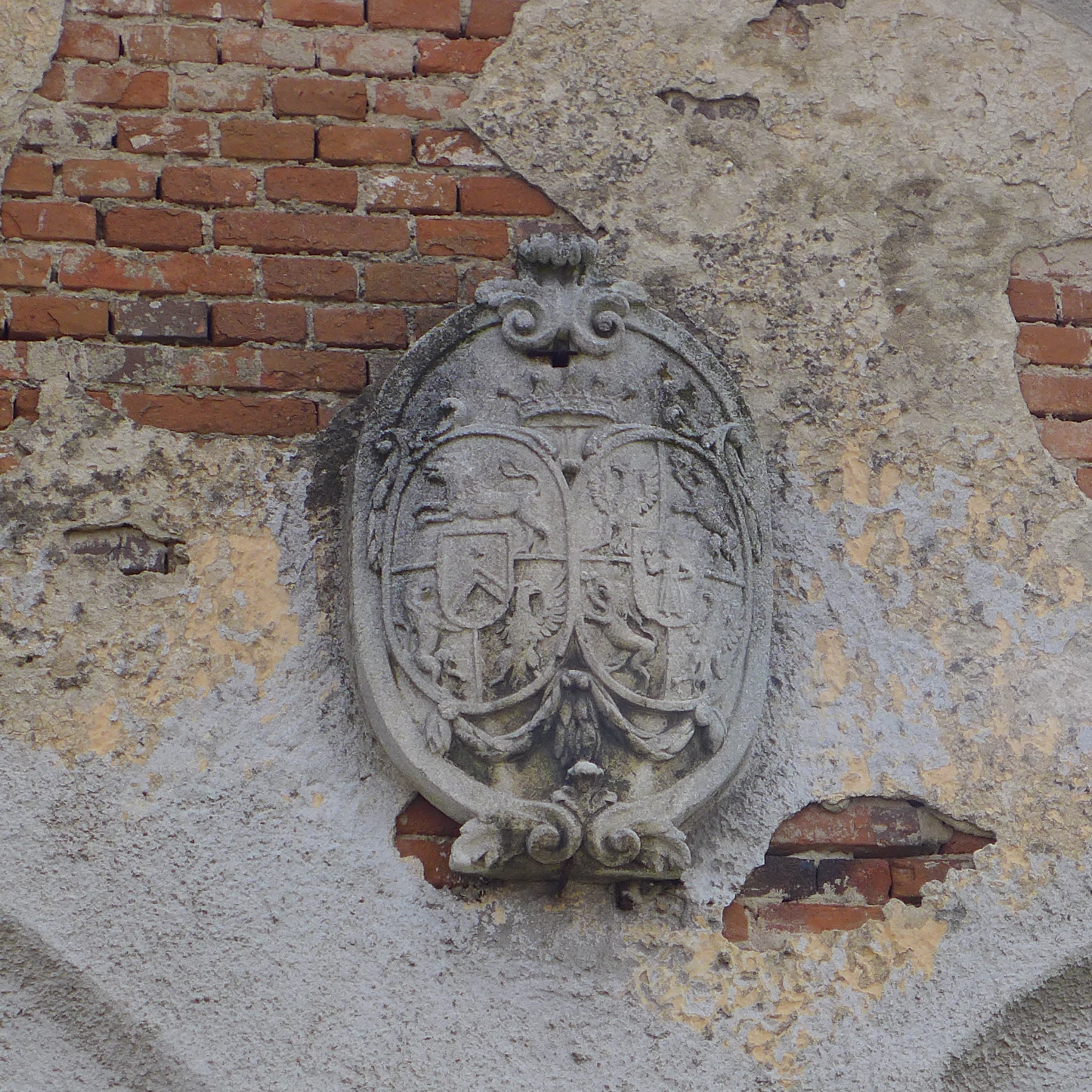 Urbanisticko architektonická zástavba historického jádra obce, čp. 1, 44, 45, 46, 63, 64, Újezd (okres Znojmo).